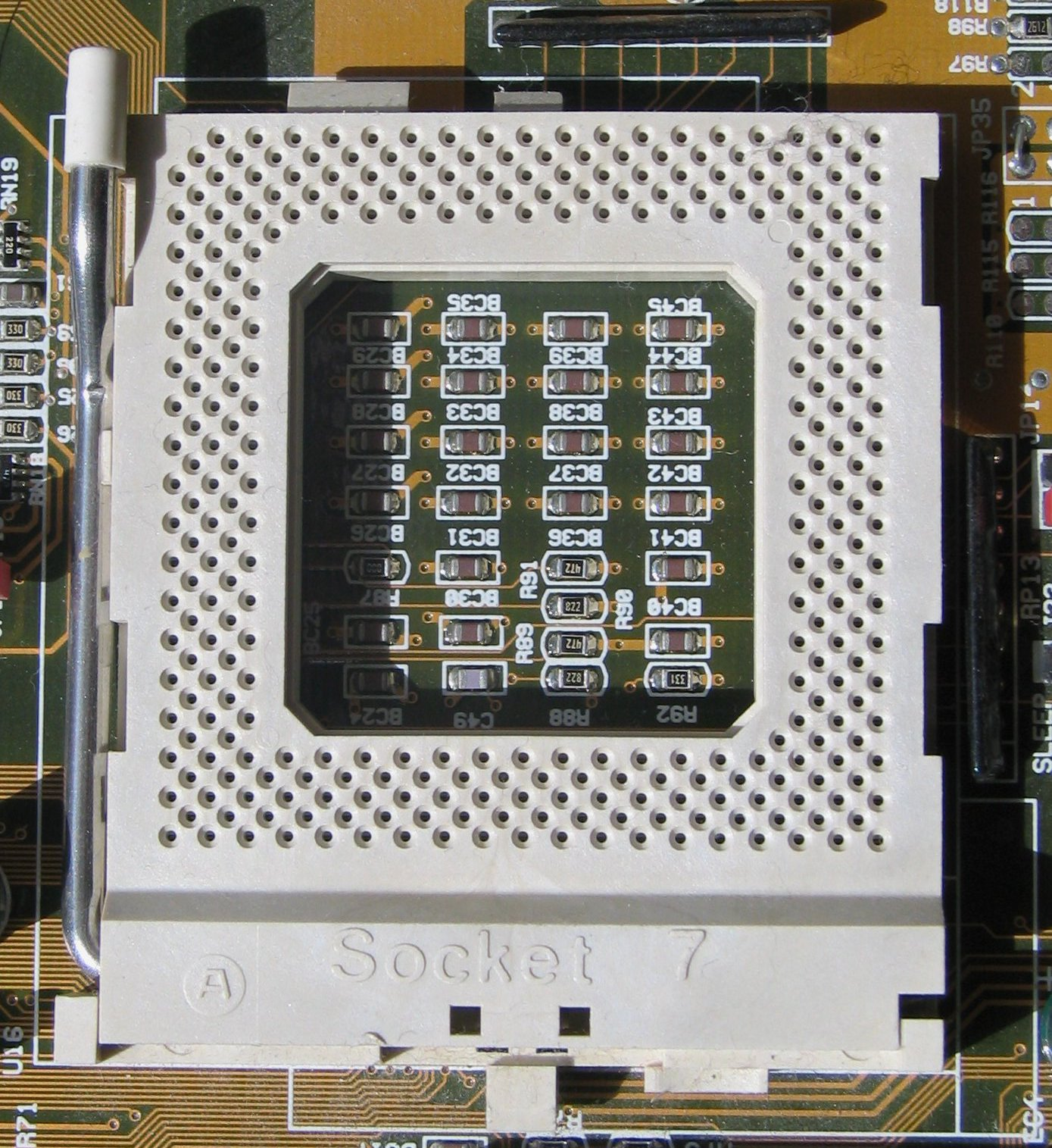 Socket 7